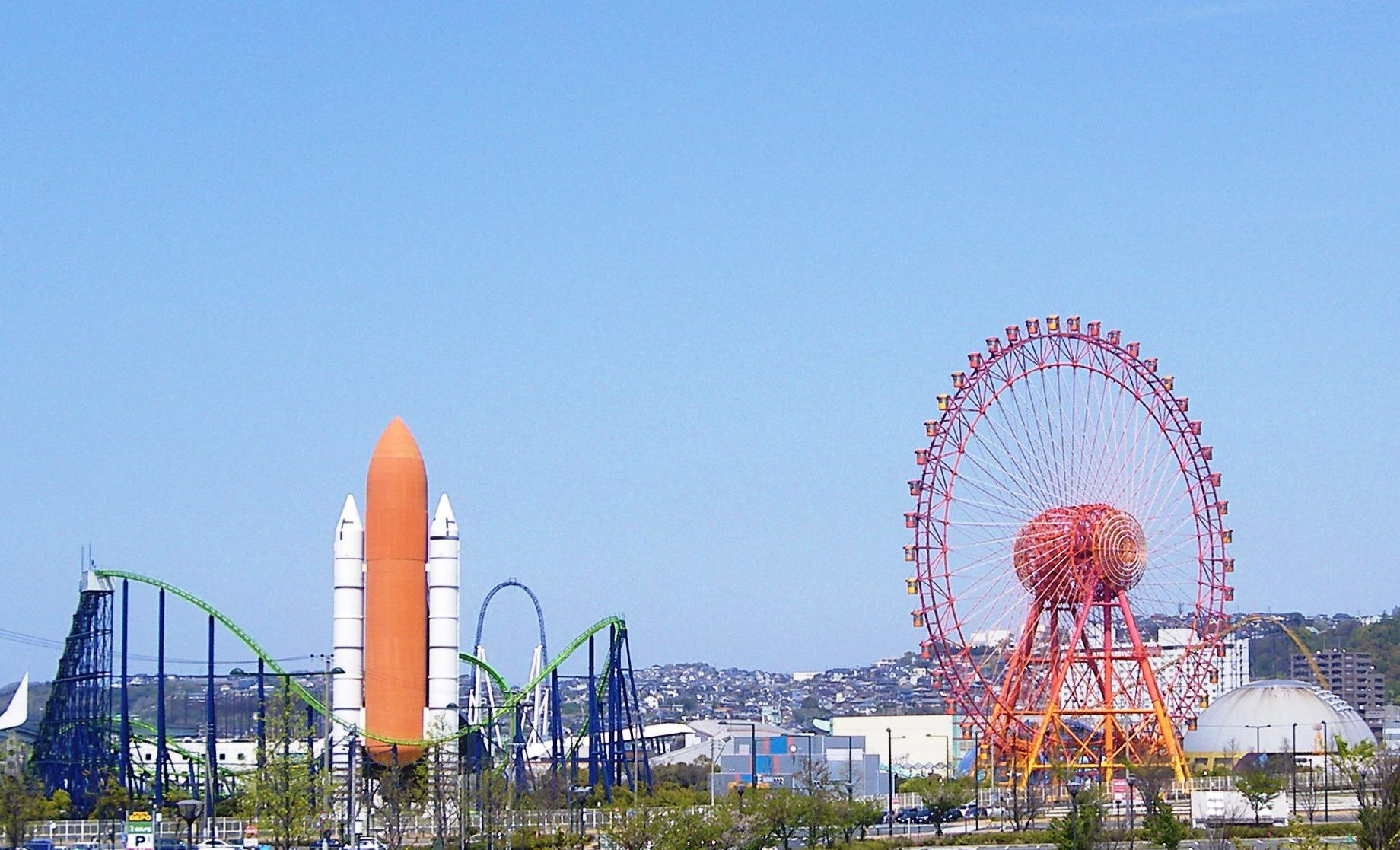 北九州市八幡東区東田にあるスペースワールド遠景